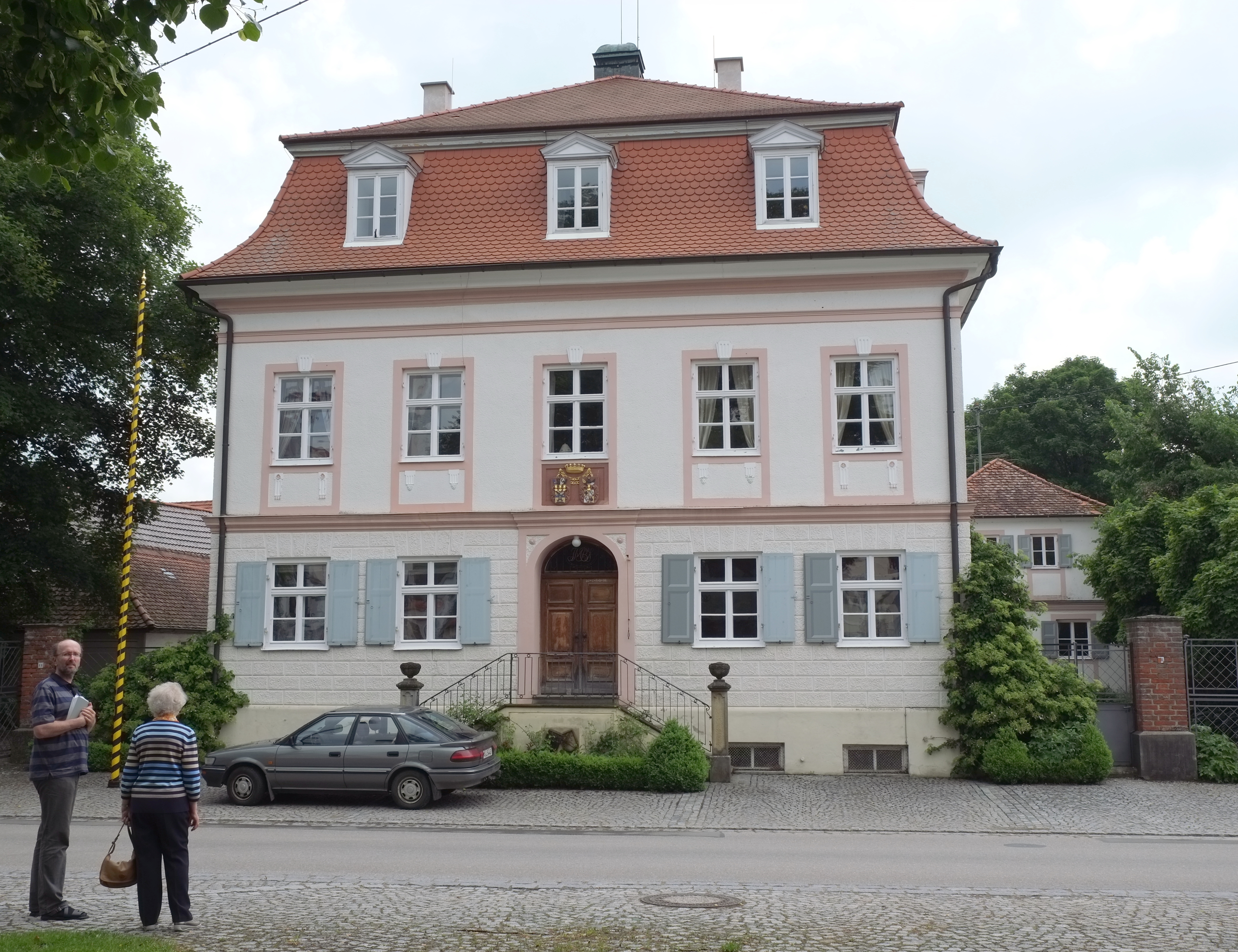 Schloss in Ettelried, einem Ortsteil von Dinkelscherben im Landkreis Augsburg (Bayern)